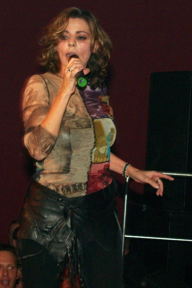 80er Jahre Party mit Sandra in der Froximun Arena.